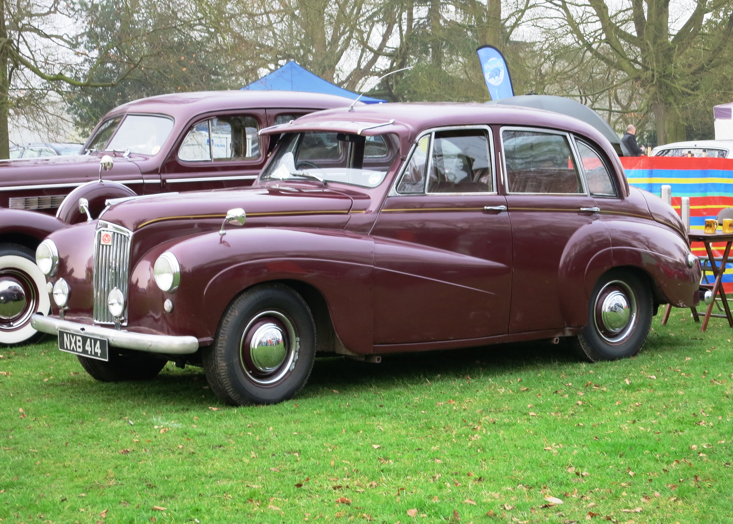 Lanchester 14